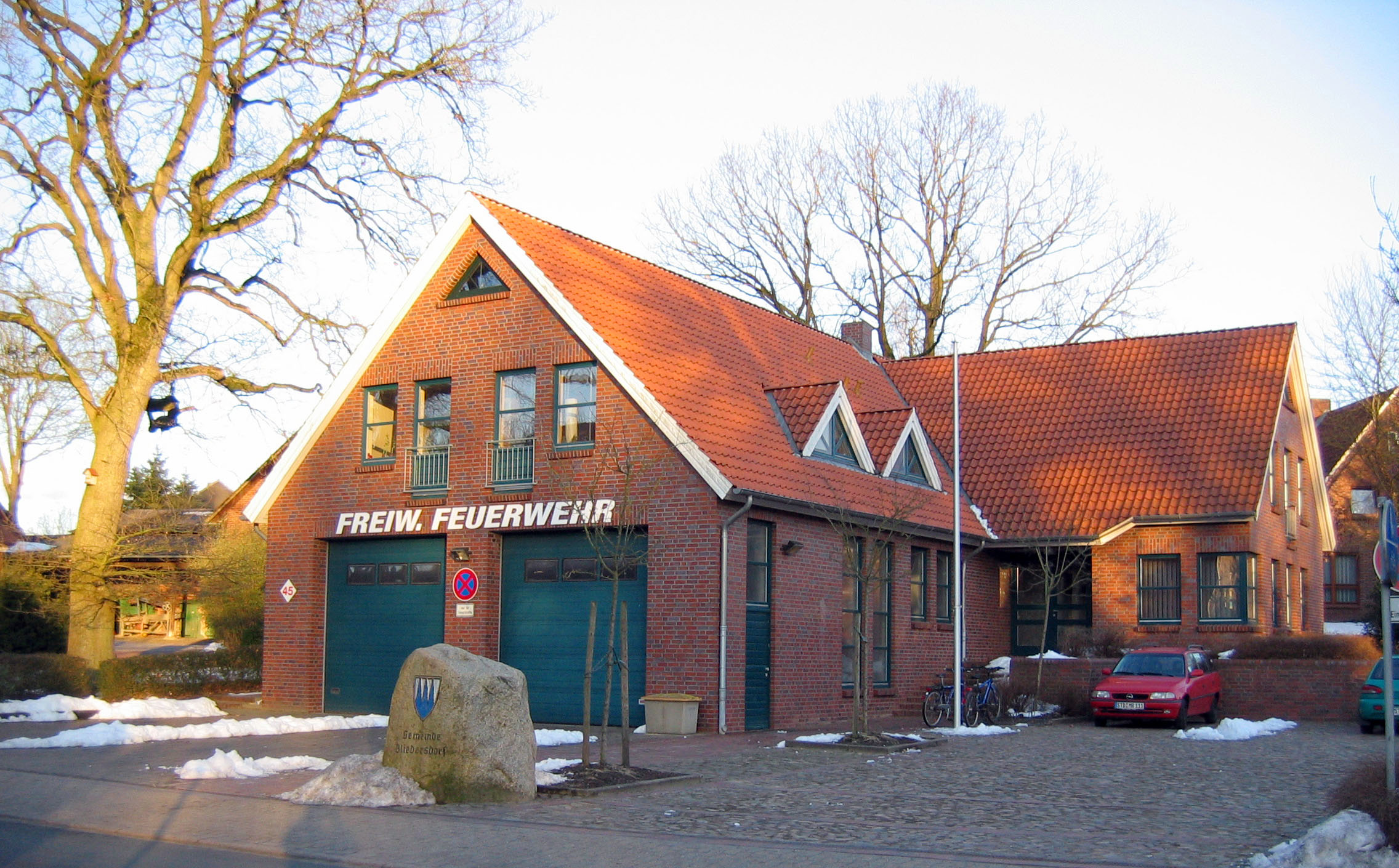 Bliedersdorf Fire Department - Feuerwehr Bliedersdorf